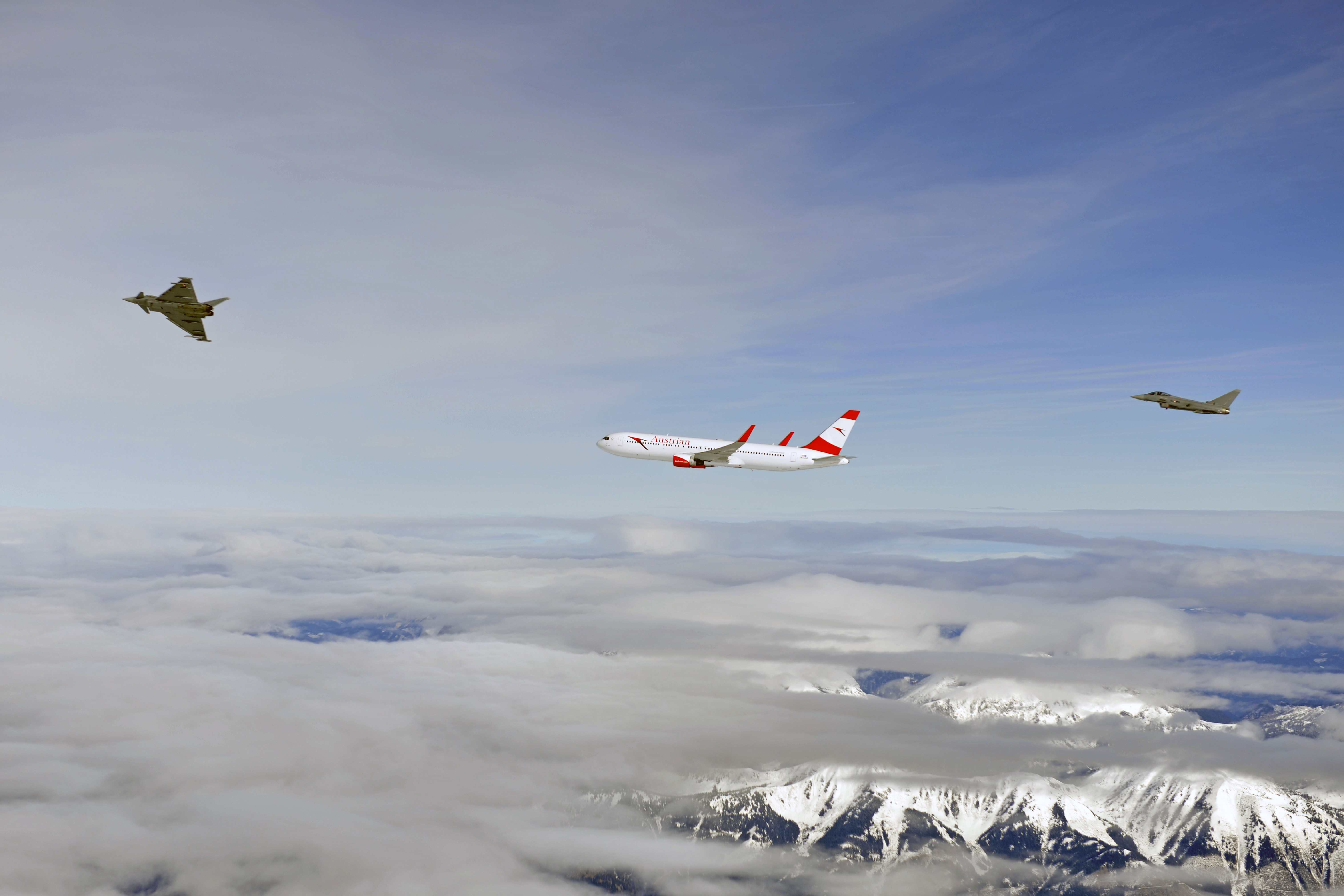 Die Eurofighter des Bundesheeres nähern sich dem Zielobjekt, der B 767 (OE-LAZ) der Austrian.